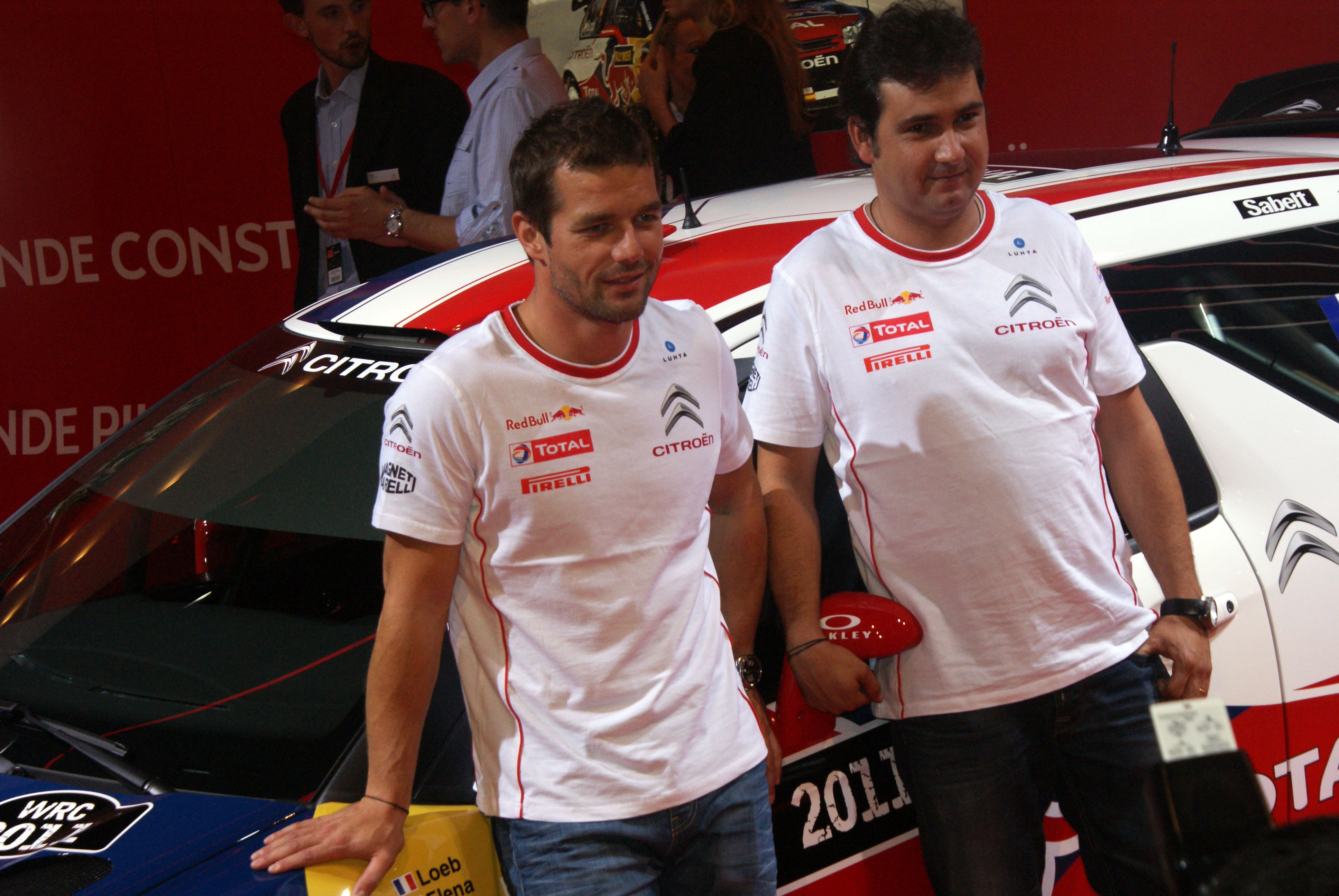 Sébastien Loeb et Daniel Elena lors de la présentation de leur DS3 WRC.